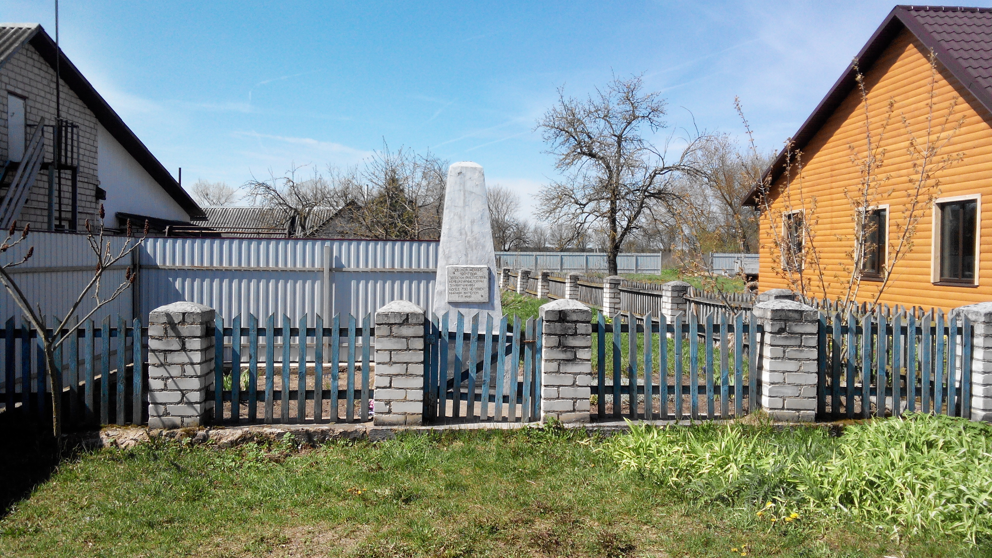 Мемориал на месте убийства нацистами в ноябре 1941 года около 700 евреев местечка Мир. Находится на улице Октябрьской около дороги между домами №№ 10 и 12. Установлен в 1967 году.